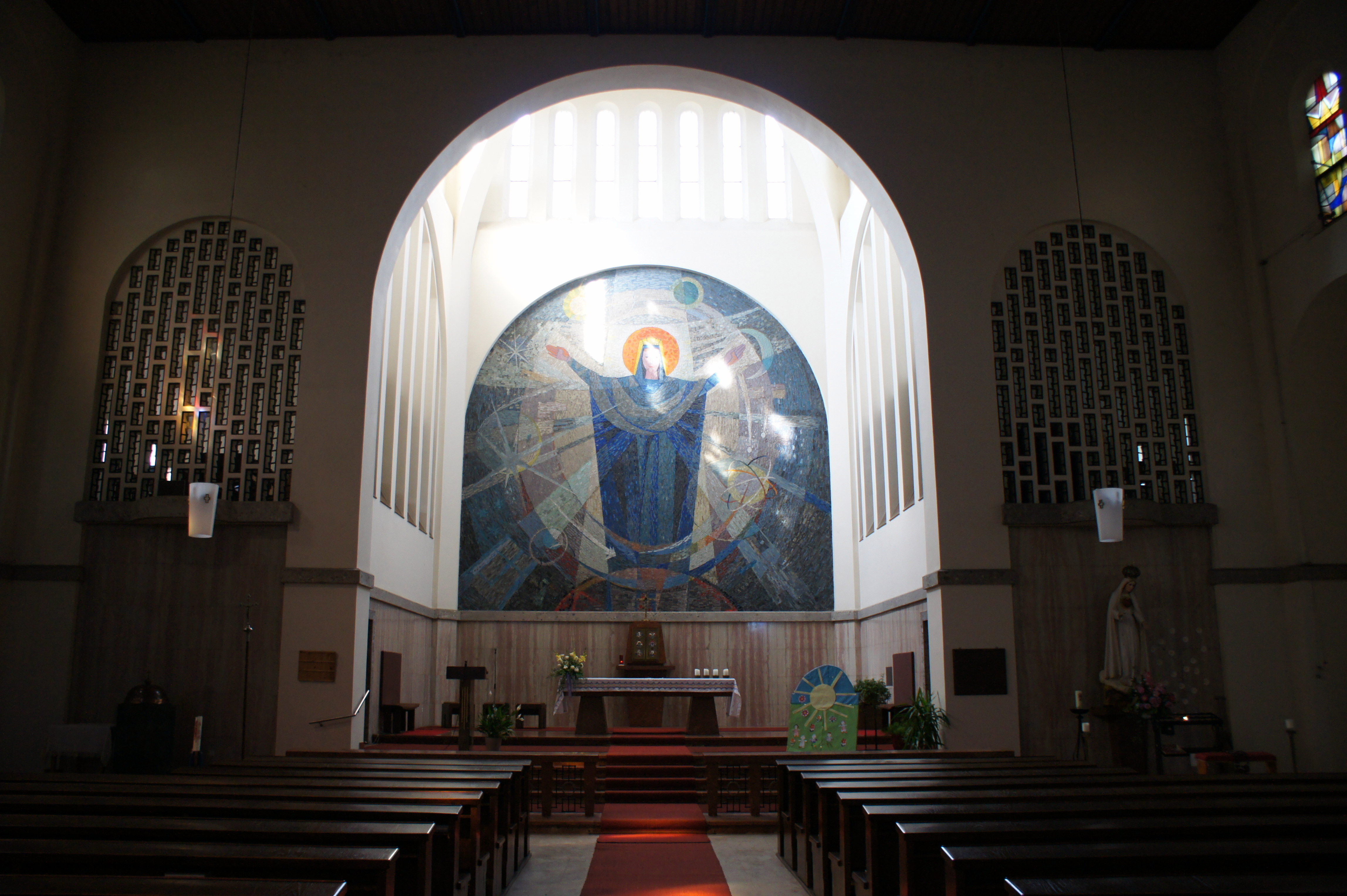 Kath. Pfarrkirche hl. Maria Königin des Weltalls, hl. Severin, hl. Theresia vom Kinde Jesu